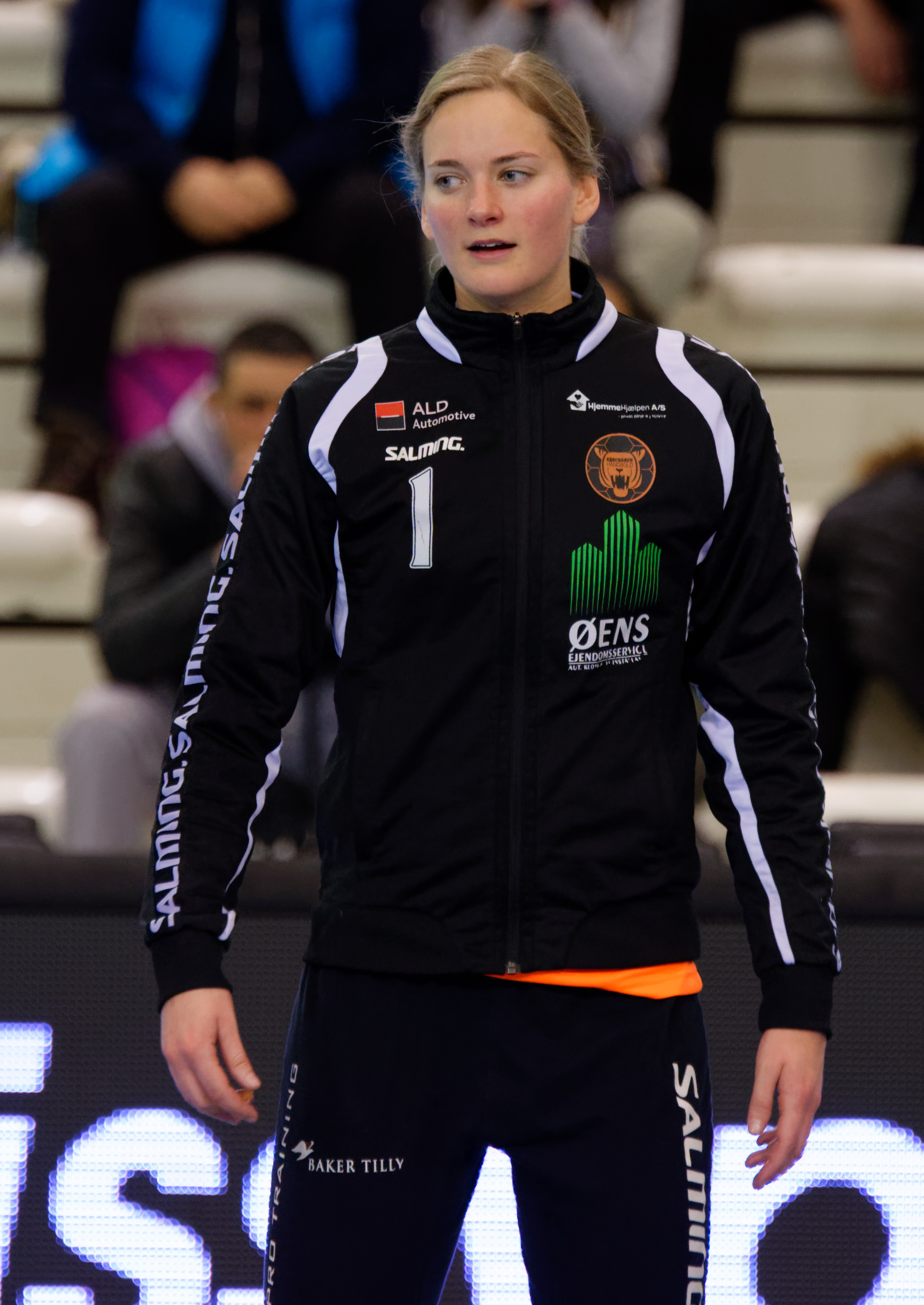 Rencontre du tour principal de la coupe EHF entre Issy Paris Hand et les danoises de Copenhague. A Issy Les Moulineaux, le 28 janvier 2018.